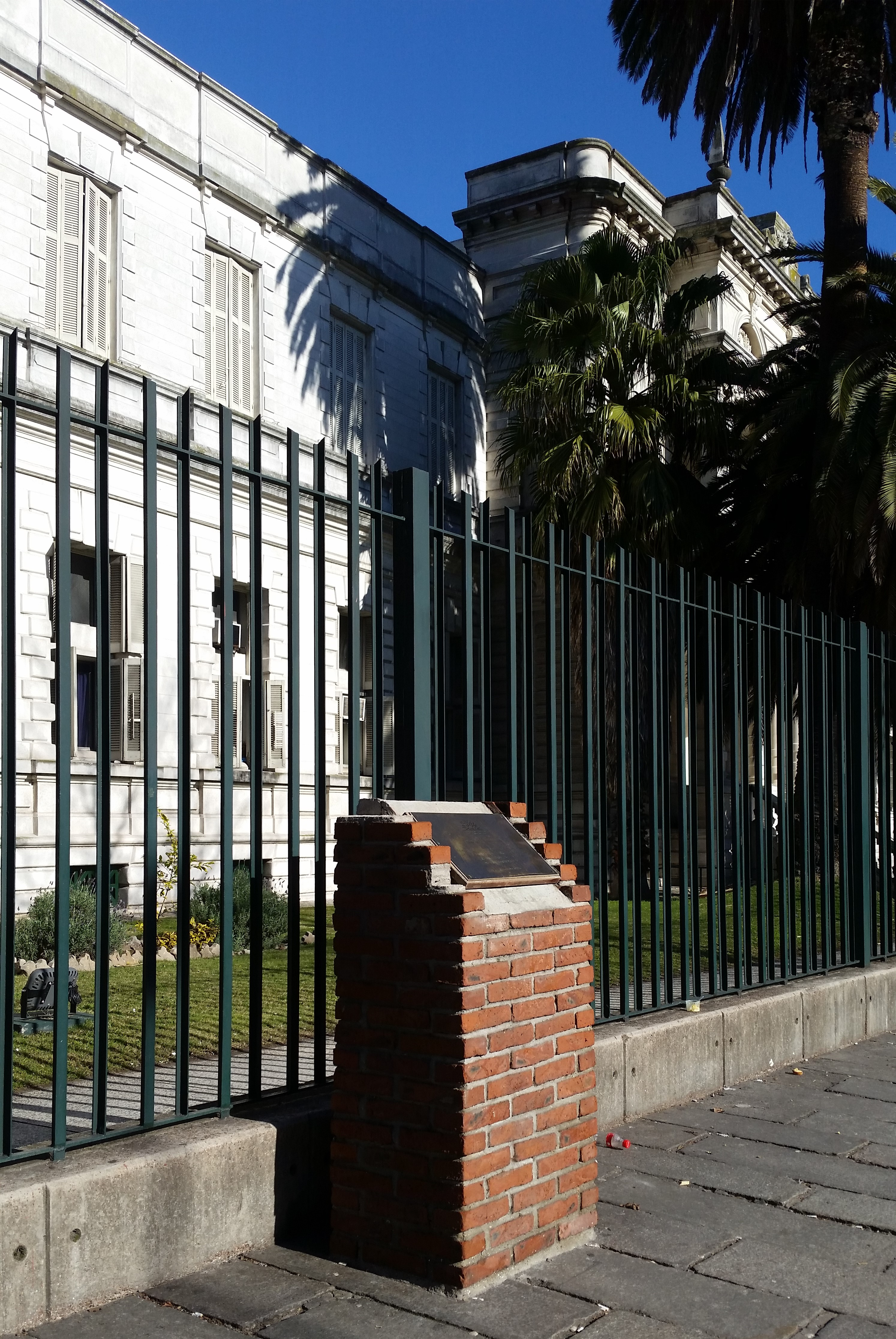 Texto placa: «Comisión Especial Ley 18.596 En este edificio funcionó la sala 8 del Hospital Militar donde estuvieron detenidos y sufrieron torturas y omisión de asistencia militantes políticos y sociales entre 1968 y 1985. Nunca más terrorismo de Estado. 28 de octubre de 2016»